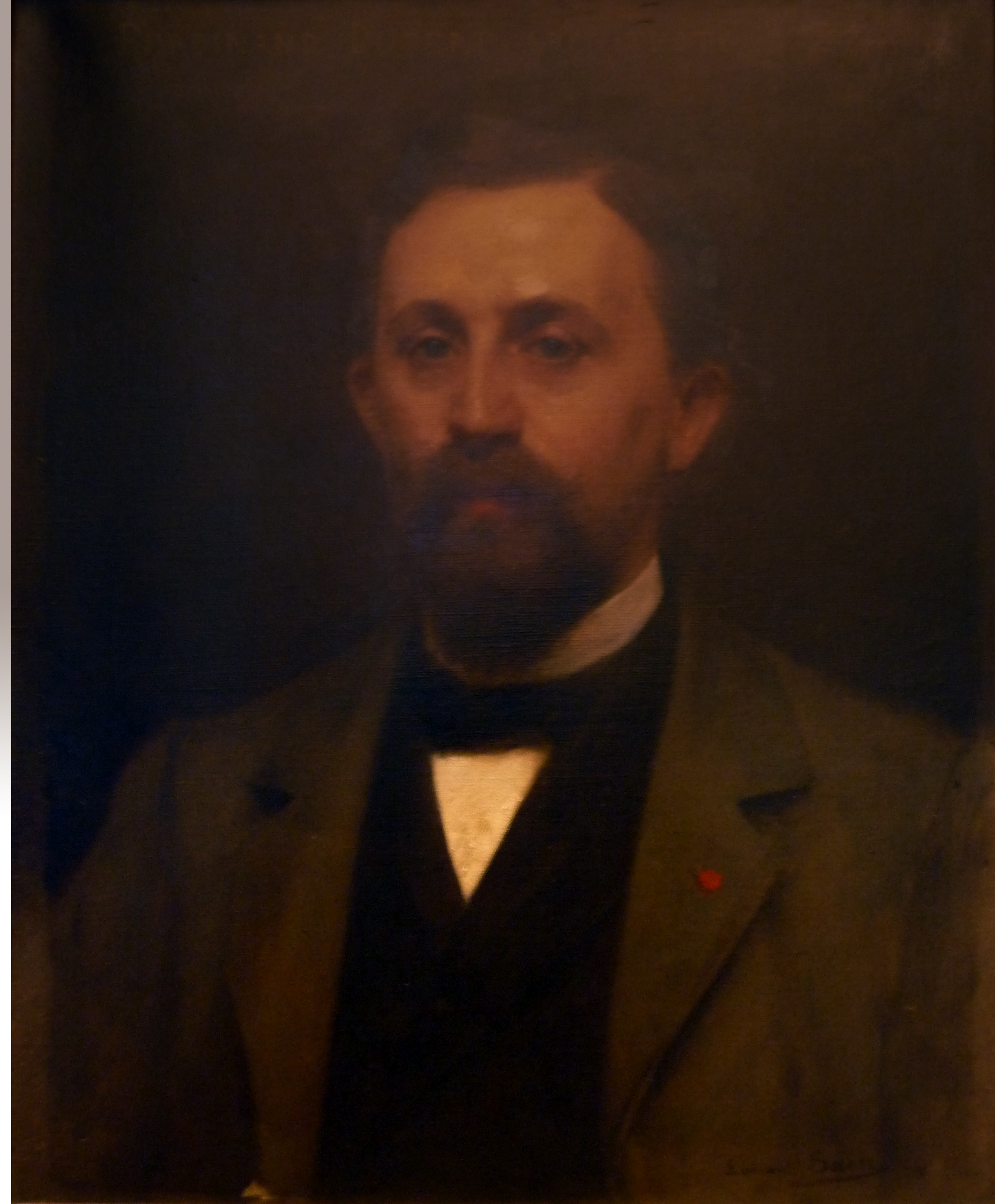 Portrait de Ferdinand Dutert, huile sur toile